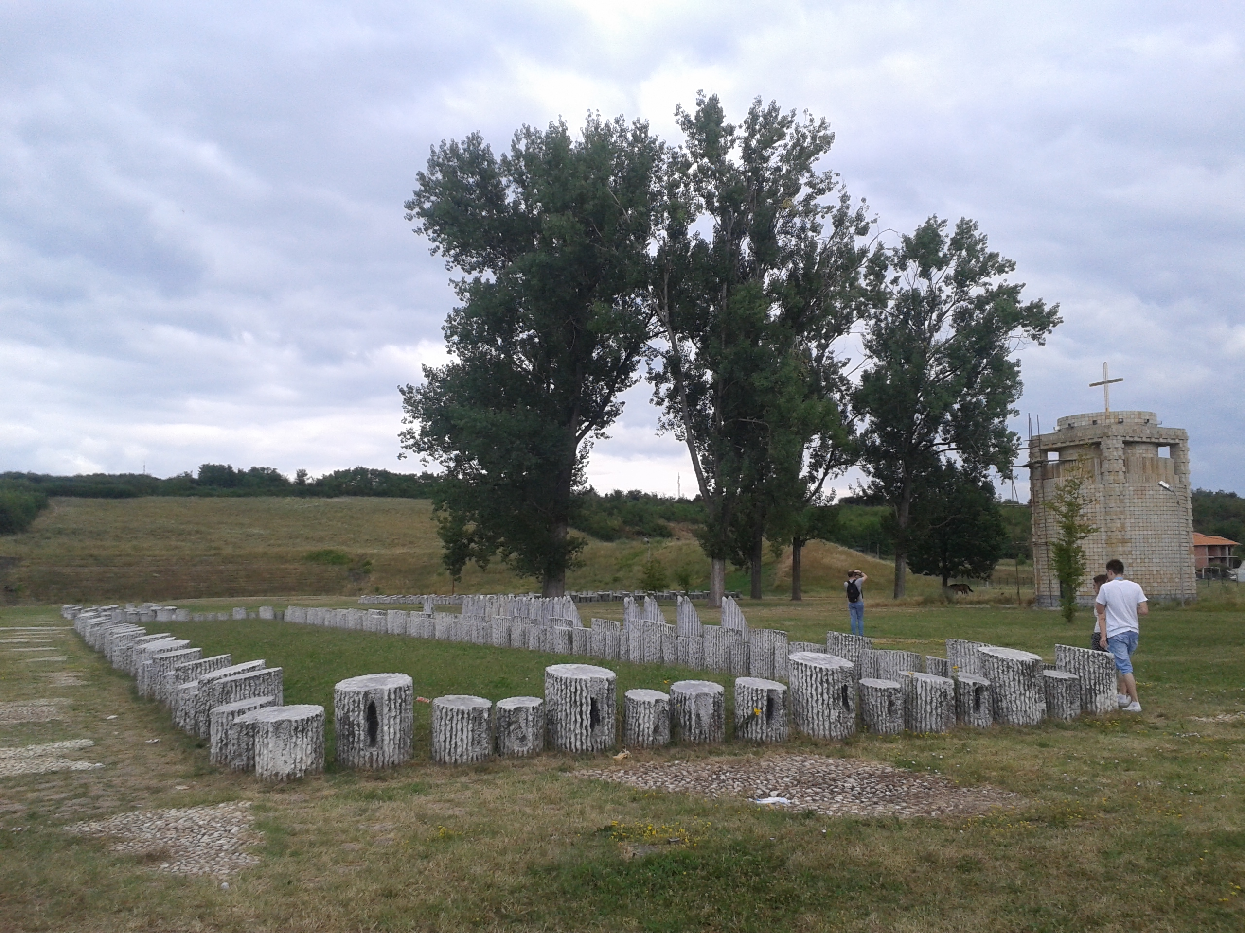 Srpski (latinica): Spomen-park u Kraljevu